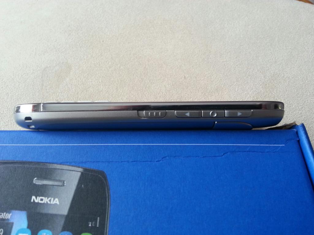 Nokia E6 biała prawa strona